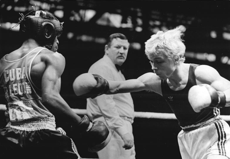 Ramon Ledon, Klaus-Dieter Kirchstein ADN-ZB Lehmann 31.3.85 Halle: XIV. Internationales Chemie-Pokal-Turnier-Den Glanzpunkt der Final-Veranstaltung setzte der 24jährige DDR-Bantamgewichtsmeister Klaus-Dieter Kirchstein (r.) der mit einer klugen technisch-taktischen und vorbildlichen kämpferischen Leistung den 18jährigen Sieger der Freundschaftswettkämpfe von Havanna 1984 und Junioren-Vizeweltmeister Ramon Ledon (Kuba) einstimmig bezwang.